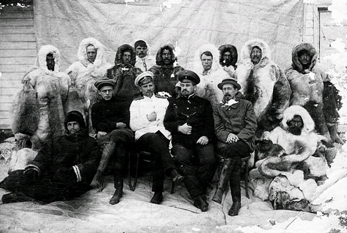 Группа членов экспедиции Г.Я. Седова. Сидят (на стульях, слева направо): В.Ю. Визе, Г.Я Седов, П.Г. Кушаков, М.А. Павлов